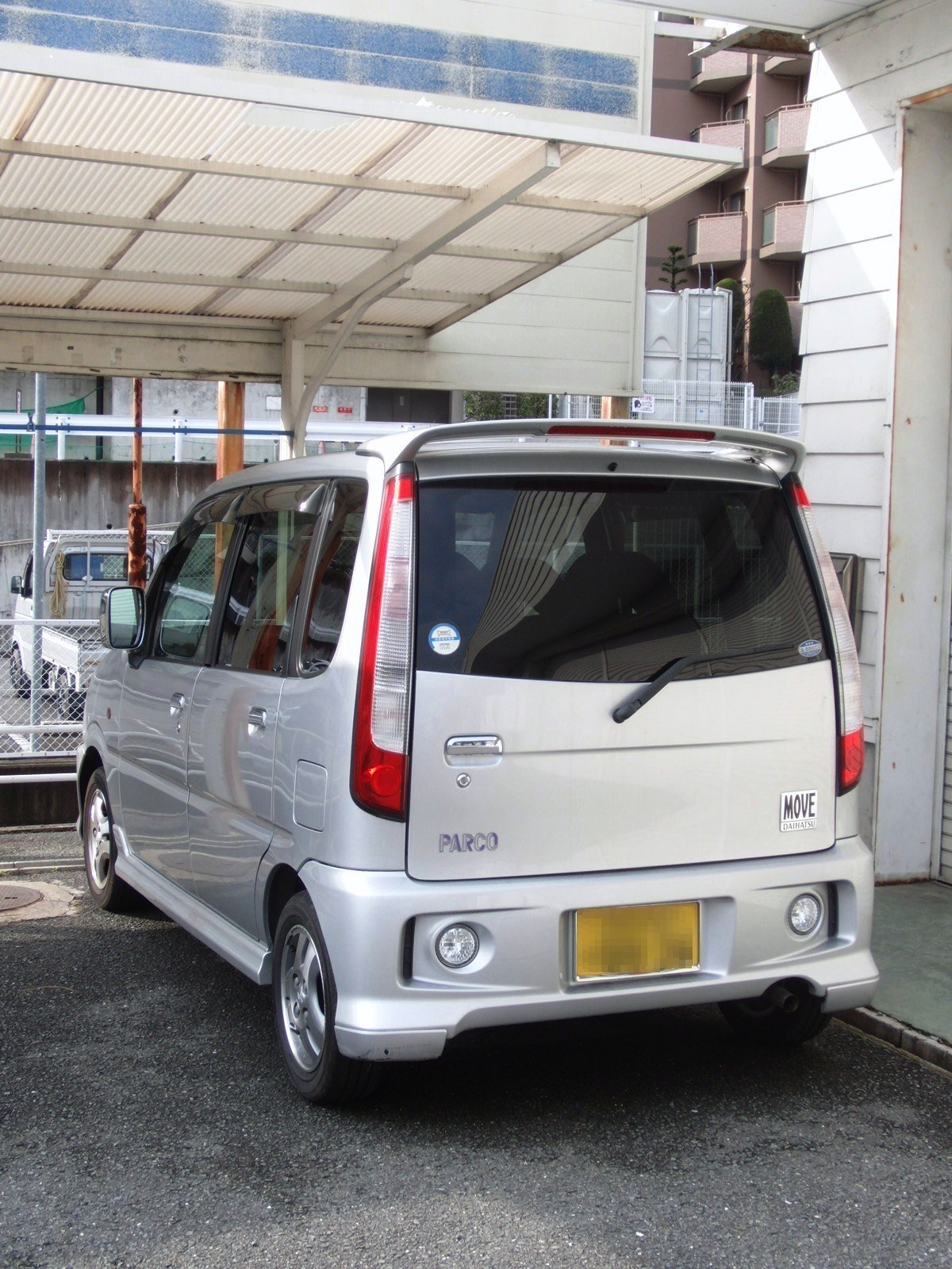 ダイハツ・ムーヴパルコを撮影